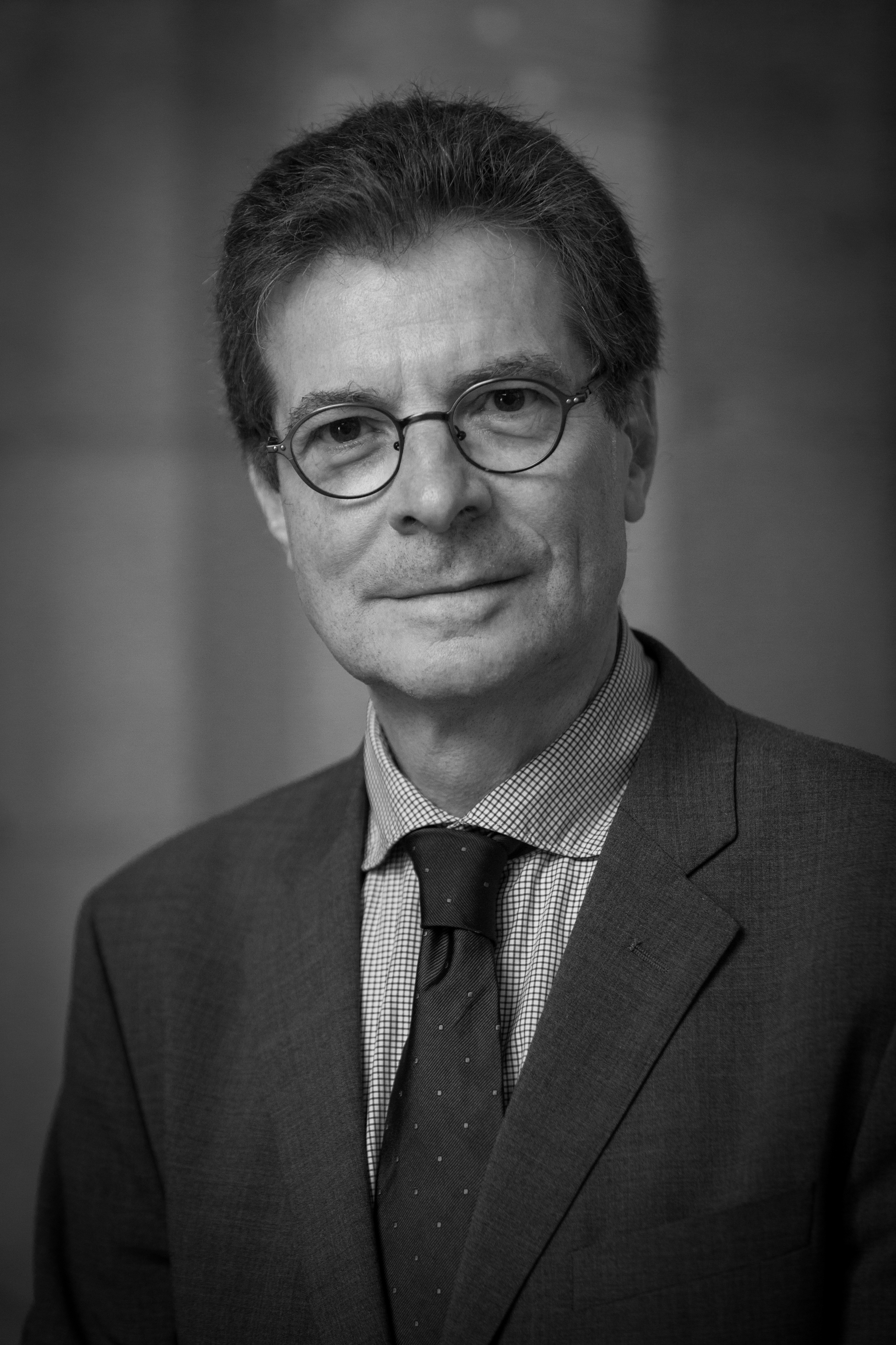 Antoine Compagnon par Claude Truong-Ngoc octobre 2015